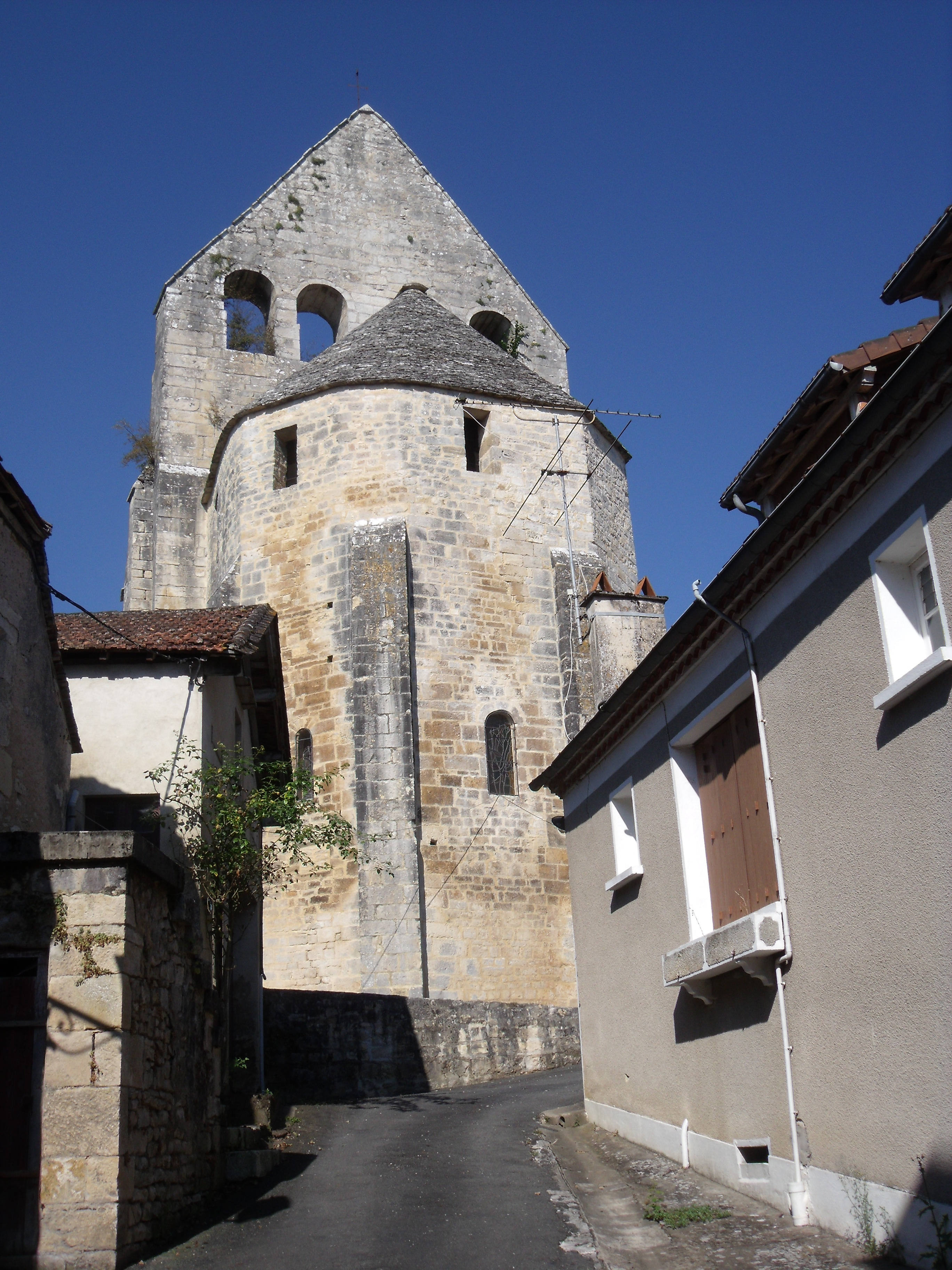 Église Saint Martin - Ajat, Dordogne, France